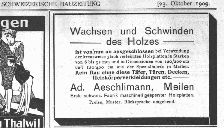 Inserat vom Oktober 1909 in der Schweizerischen Bauzeitung